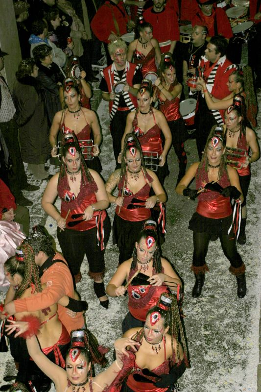 Carrossà de Markatú, Carnaval del 2007